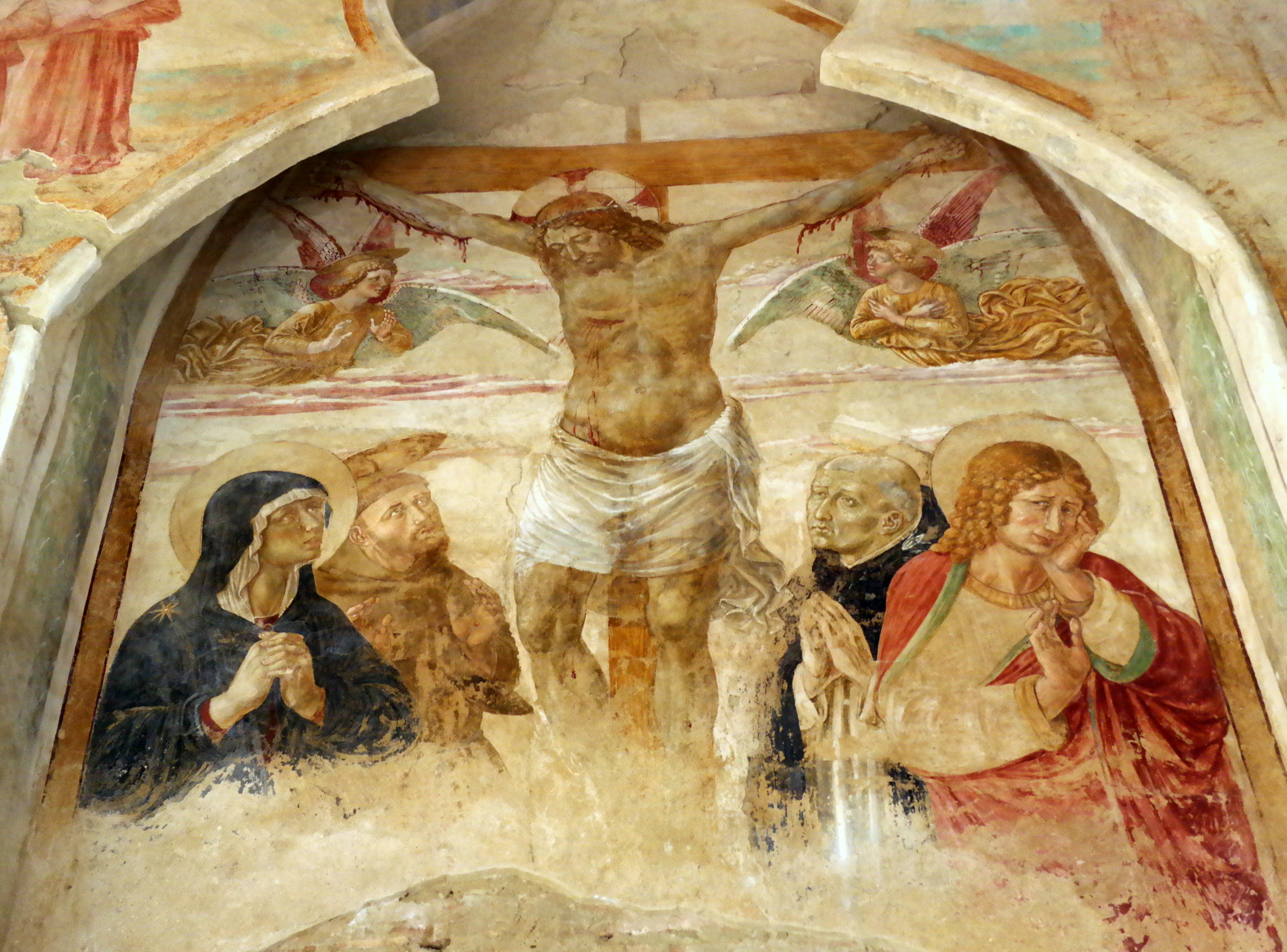 Legoli (Pi) , Tabernacolo affrescato da Benozzo Gozzoli nel 1480 circa. Scena della Crocifissione